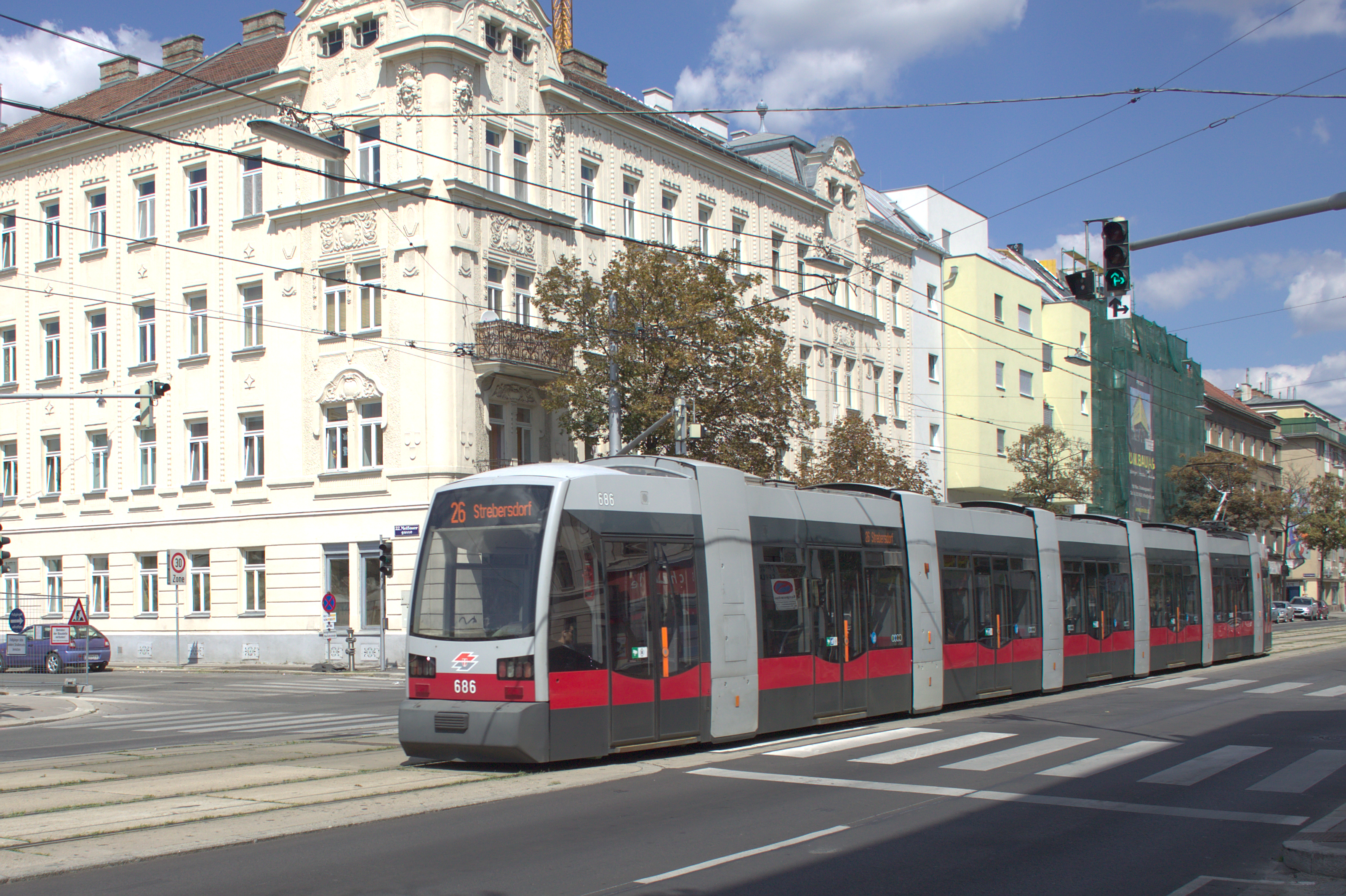 Die seit 20. August 2013 eingestellte Wiener Straßenbahnstrecke Kagran U - Kagraner Platz U, befahren von der Linie 26 (bis 2006 auch von der Linie 25).